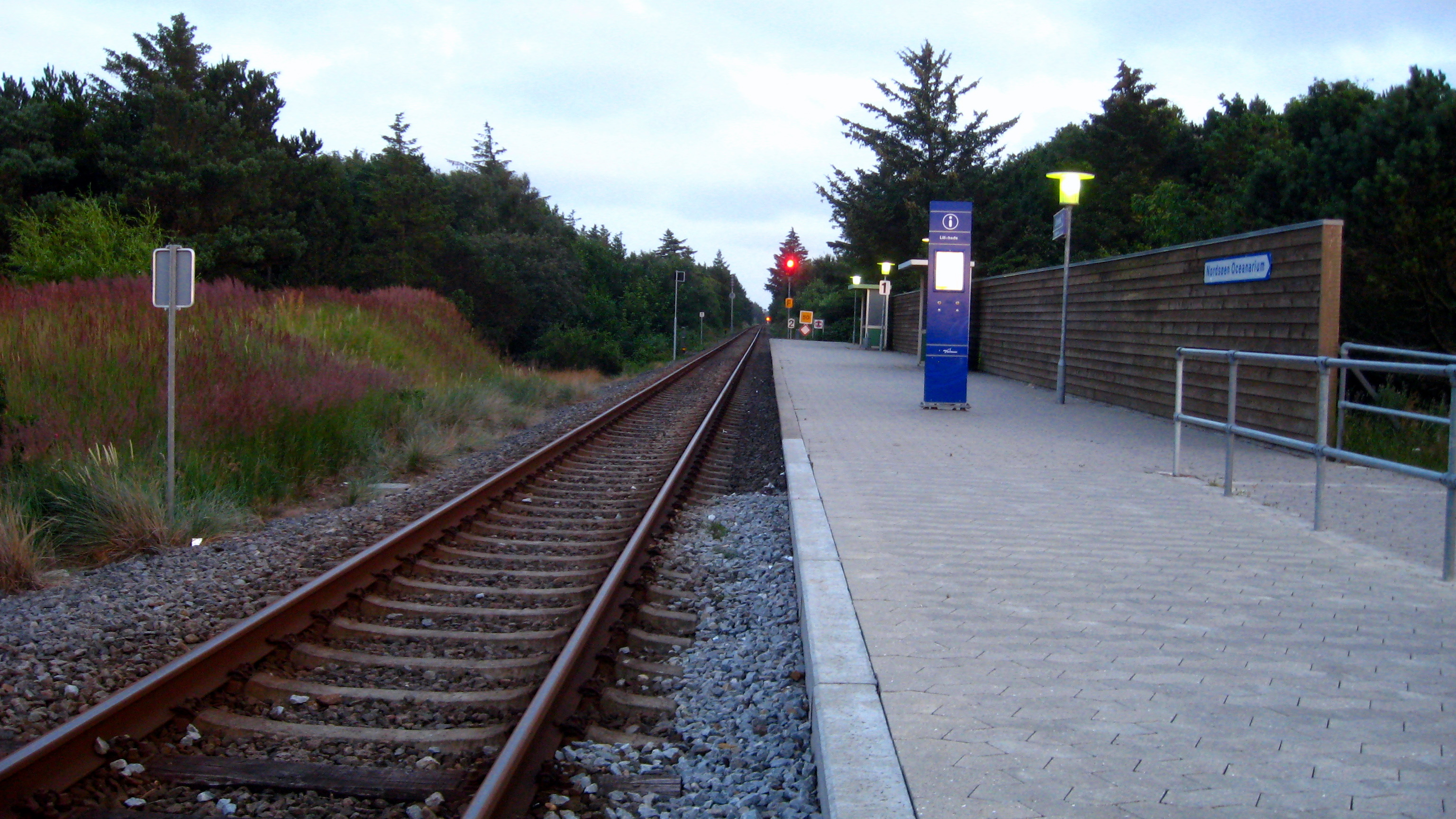 Lilleheden Trinbræt er en dansk jernbanestation i Hirtshals, mellem Emmersbæk Trinbræt og Hirtshals Station (Nordjyske Jernbane)